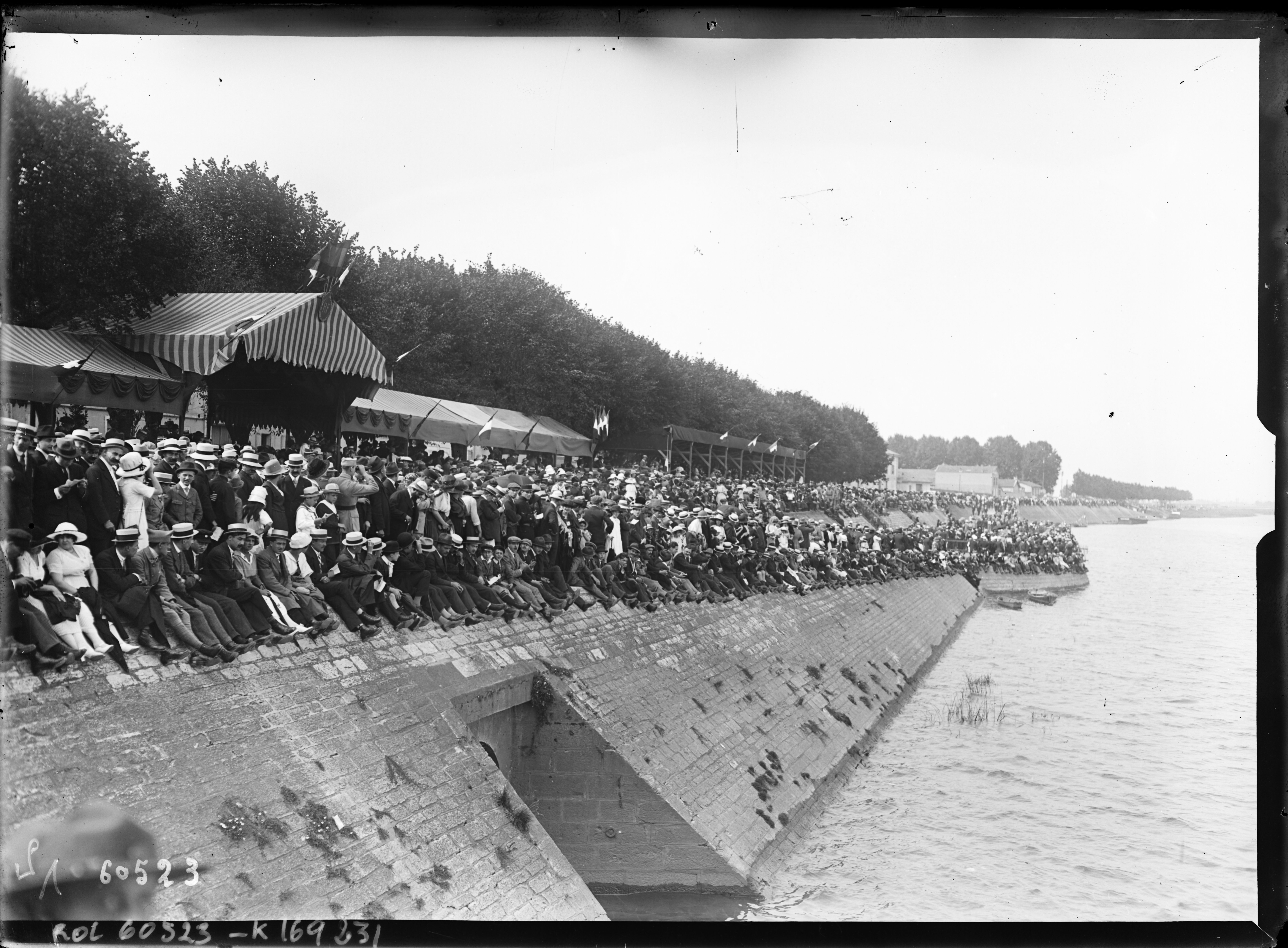 Mâcon, vue générale des tribunes [15/8/20, championnats d'Europe d'aviron] : [photographie de presse] / [Agence Rol]